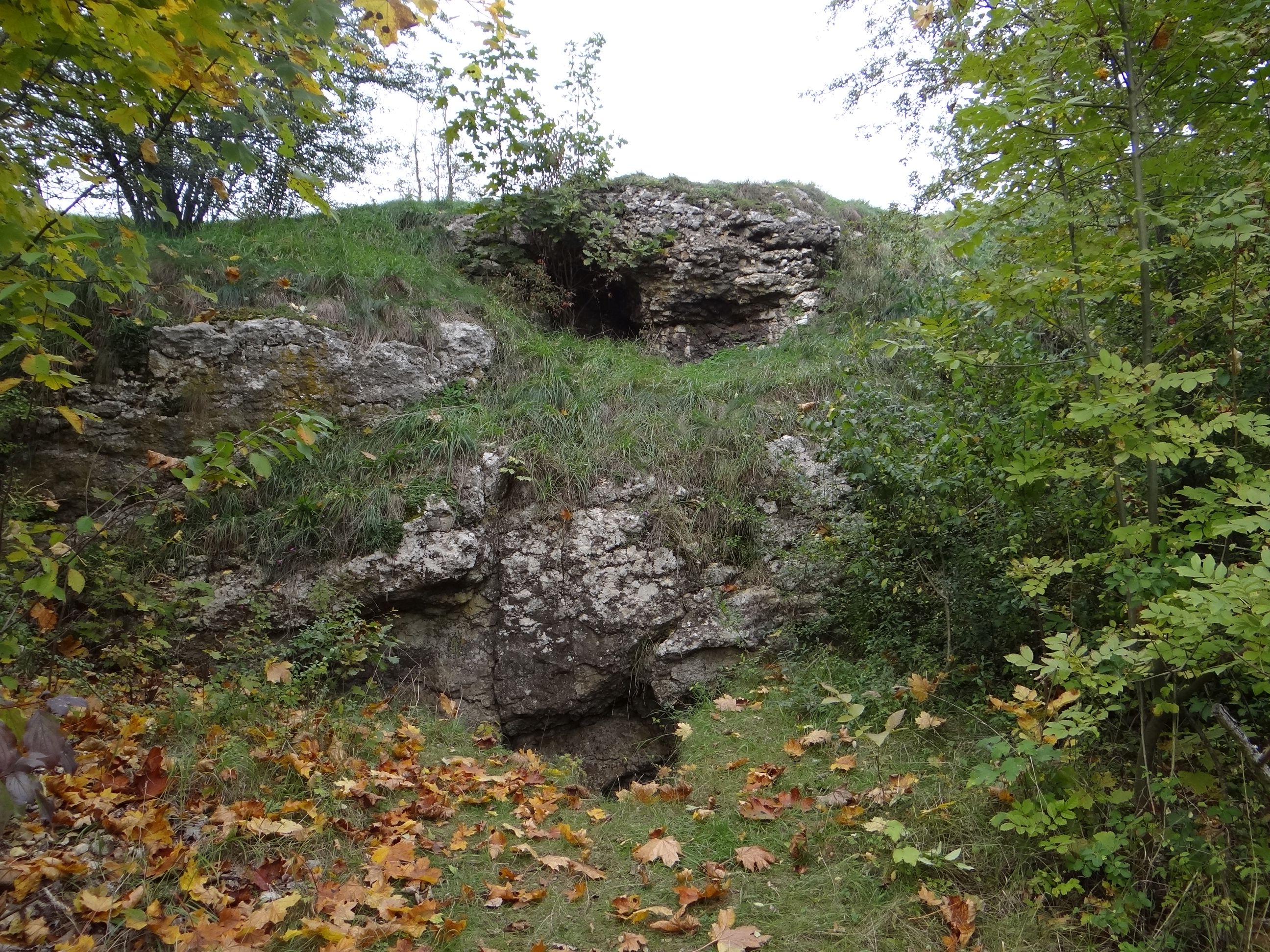 Jaskinia pod Nyżą